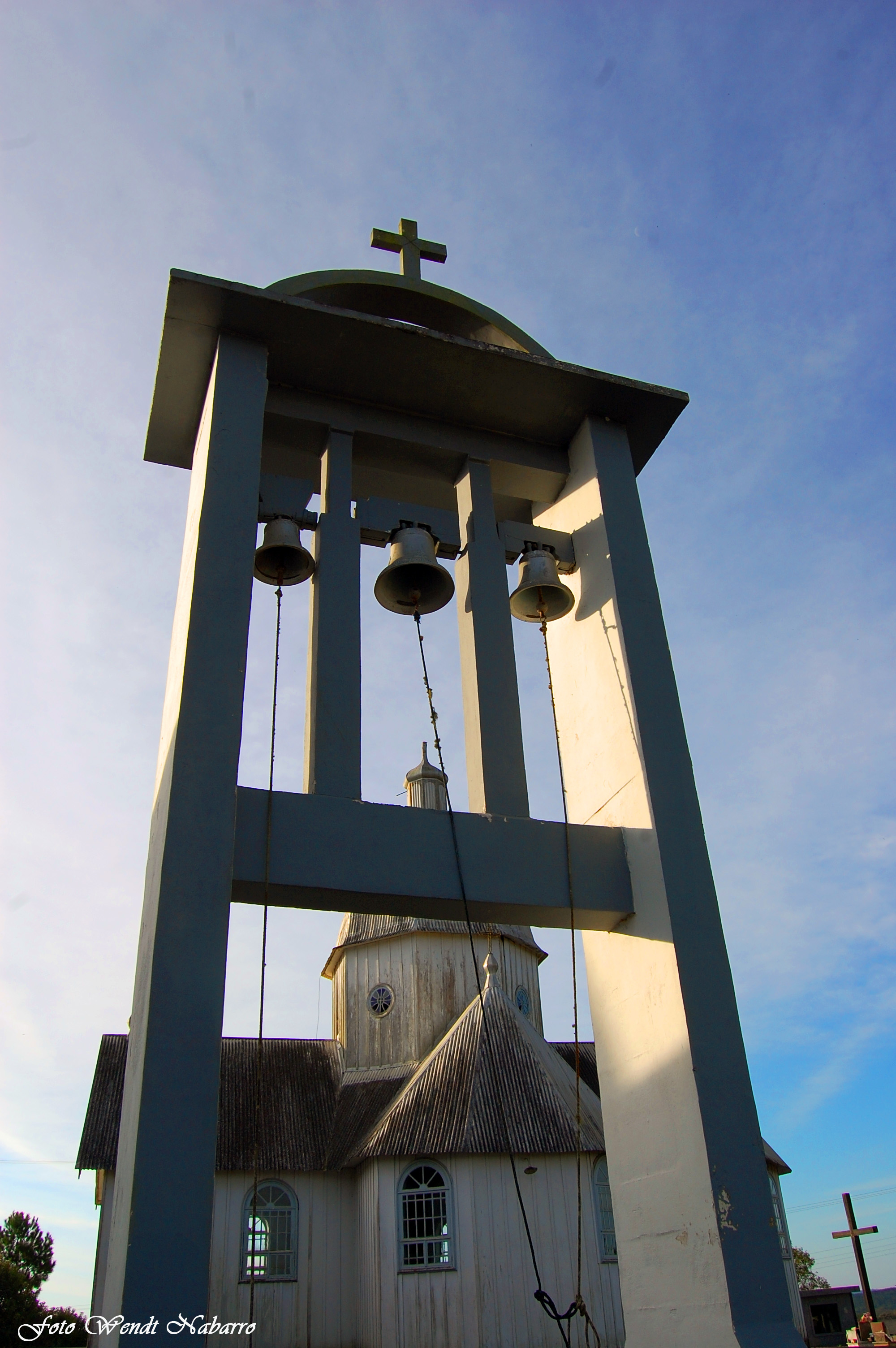 Campanário da Igreja de São Pedro e São Paulo, em Moema, Itaiópolis, Santa Catarina, Brasil.